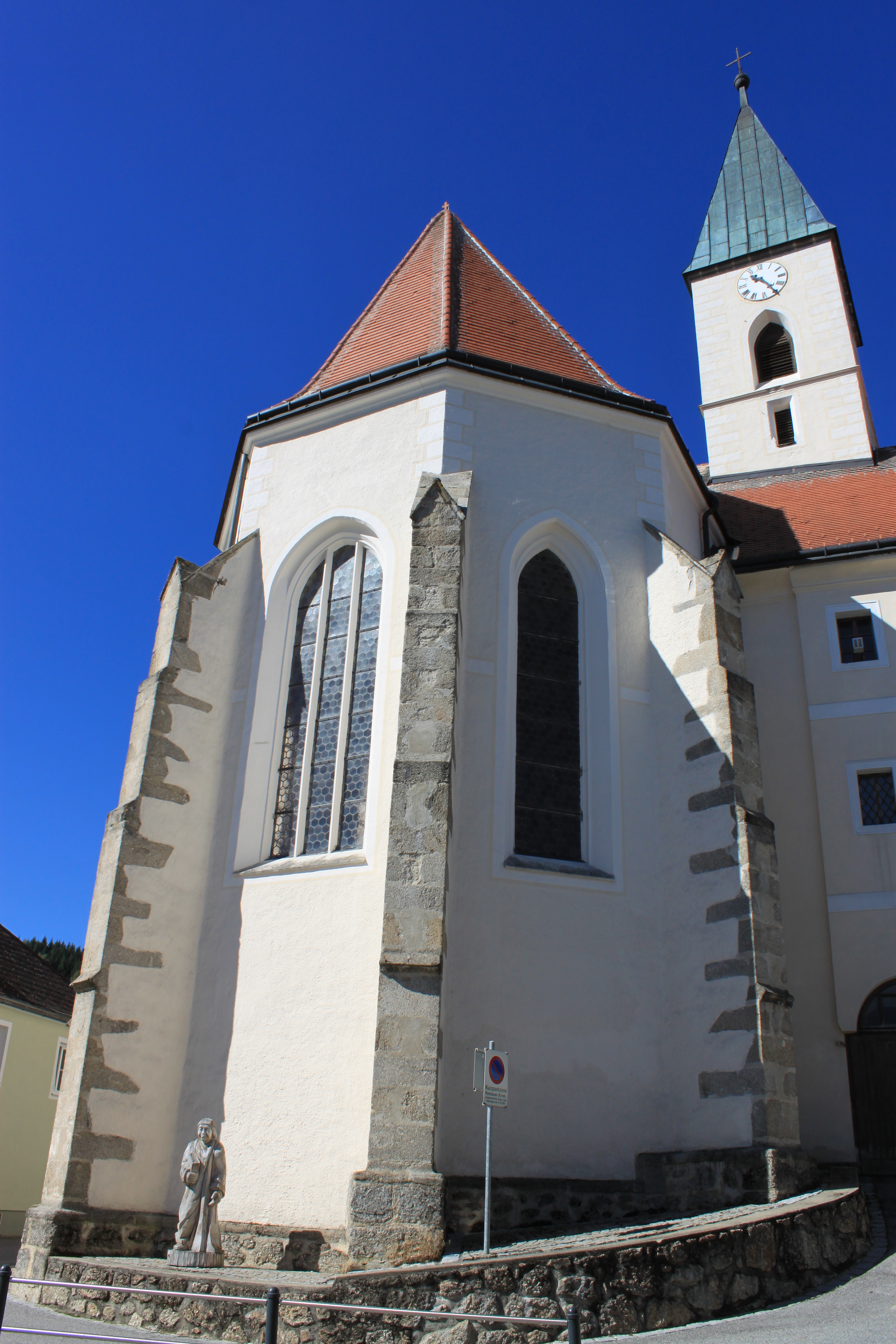 Wallfahrtskirche Maria Rast, Schönbach, Niederösterreich.